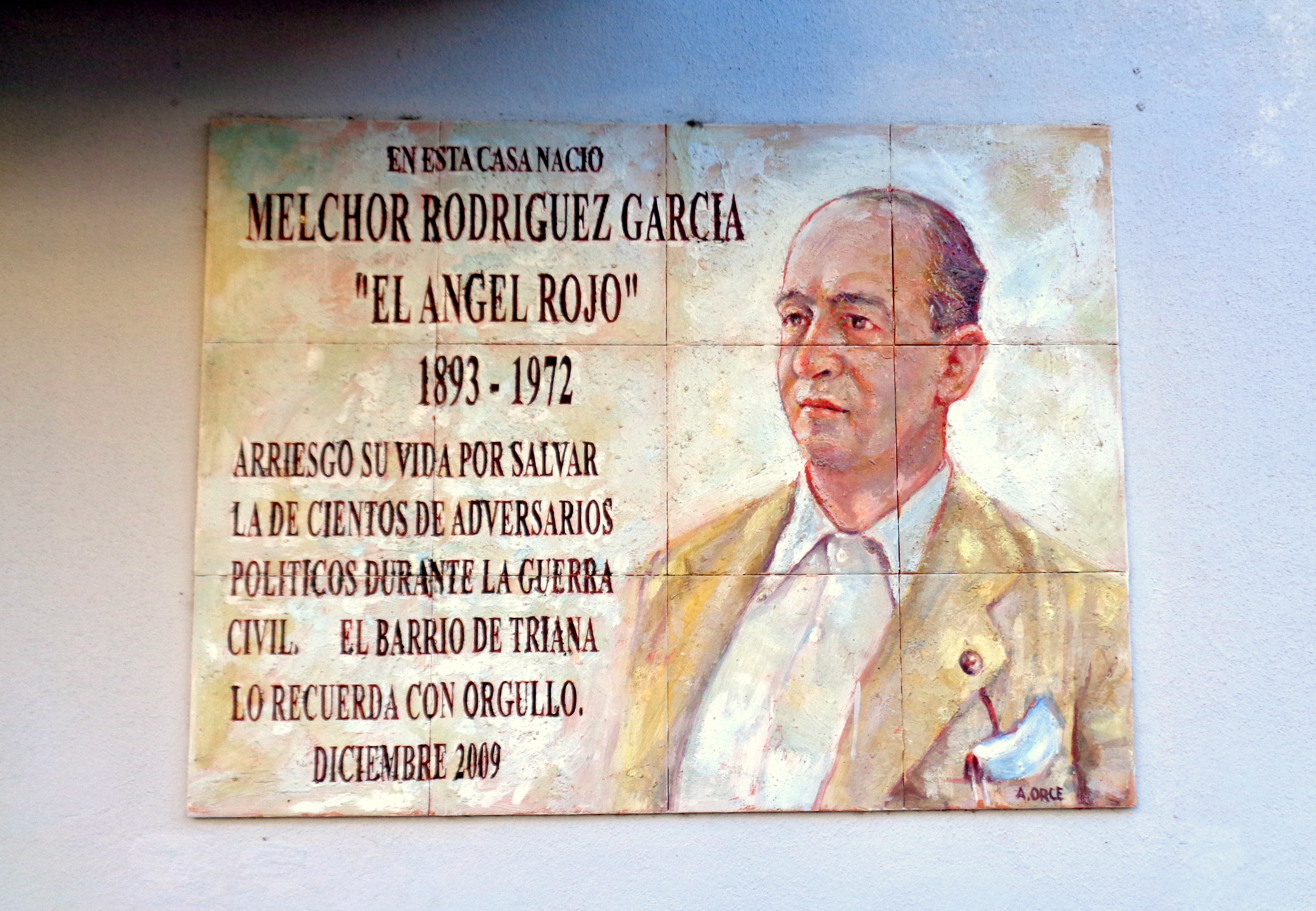 Placa colocada en 2009 en memoria de Melchor Rodríguez García en la casa donde nació. Se encuentra en el barrio de Triana de Sevilla.